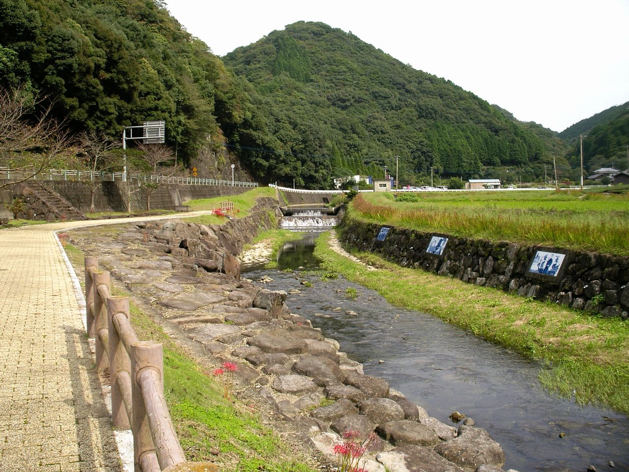 波佐見町・稗の尾河川公園。川棚川沿いに公園が作られている。